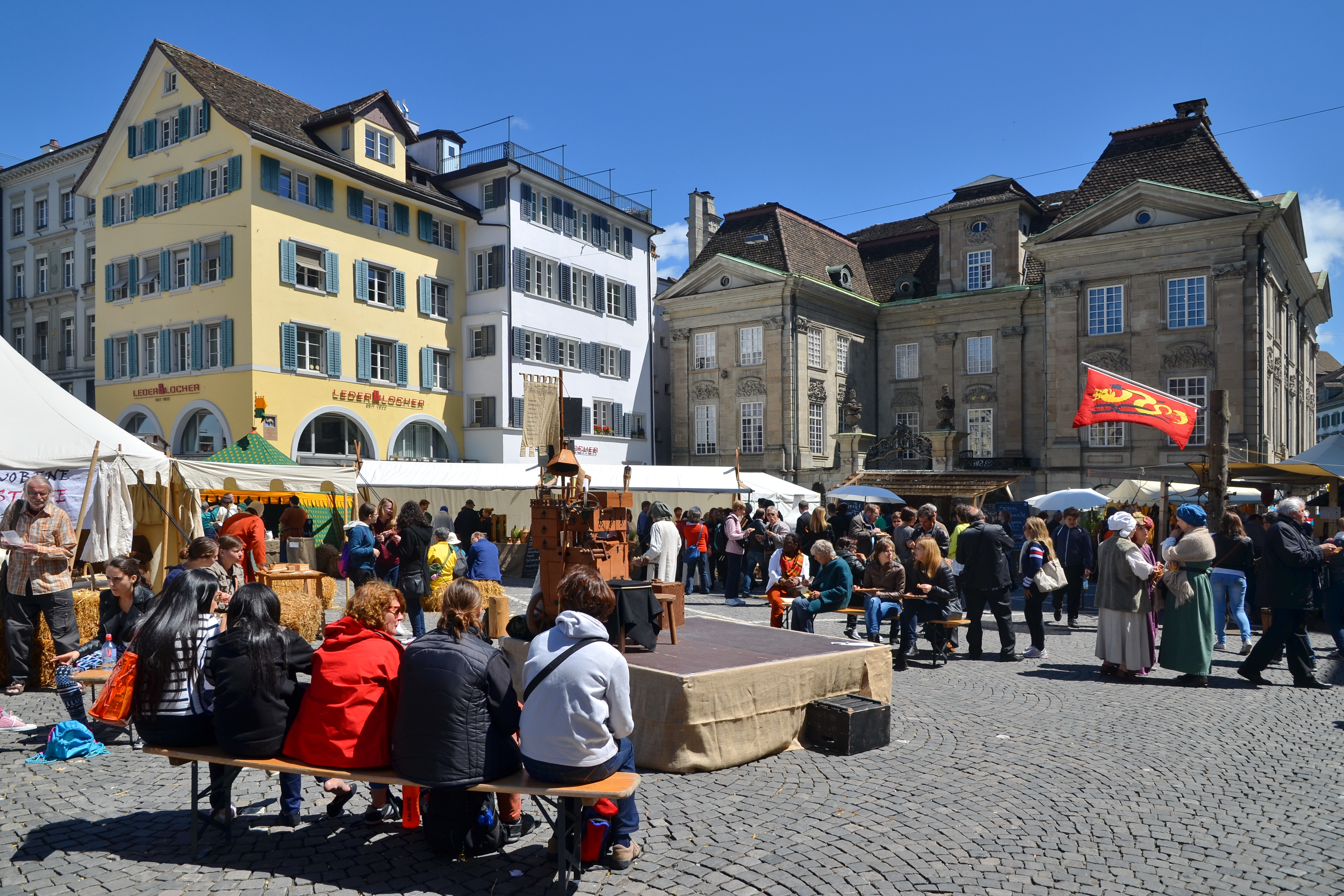 Mittelalter Spectaculum (23. bis 25. Mai 2014) der Gesellschaft zu Fraumünster auf dem Münsterhof in Zürich